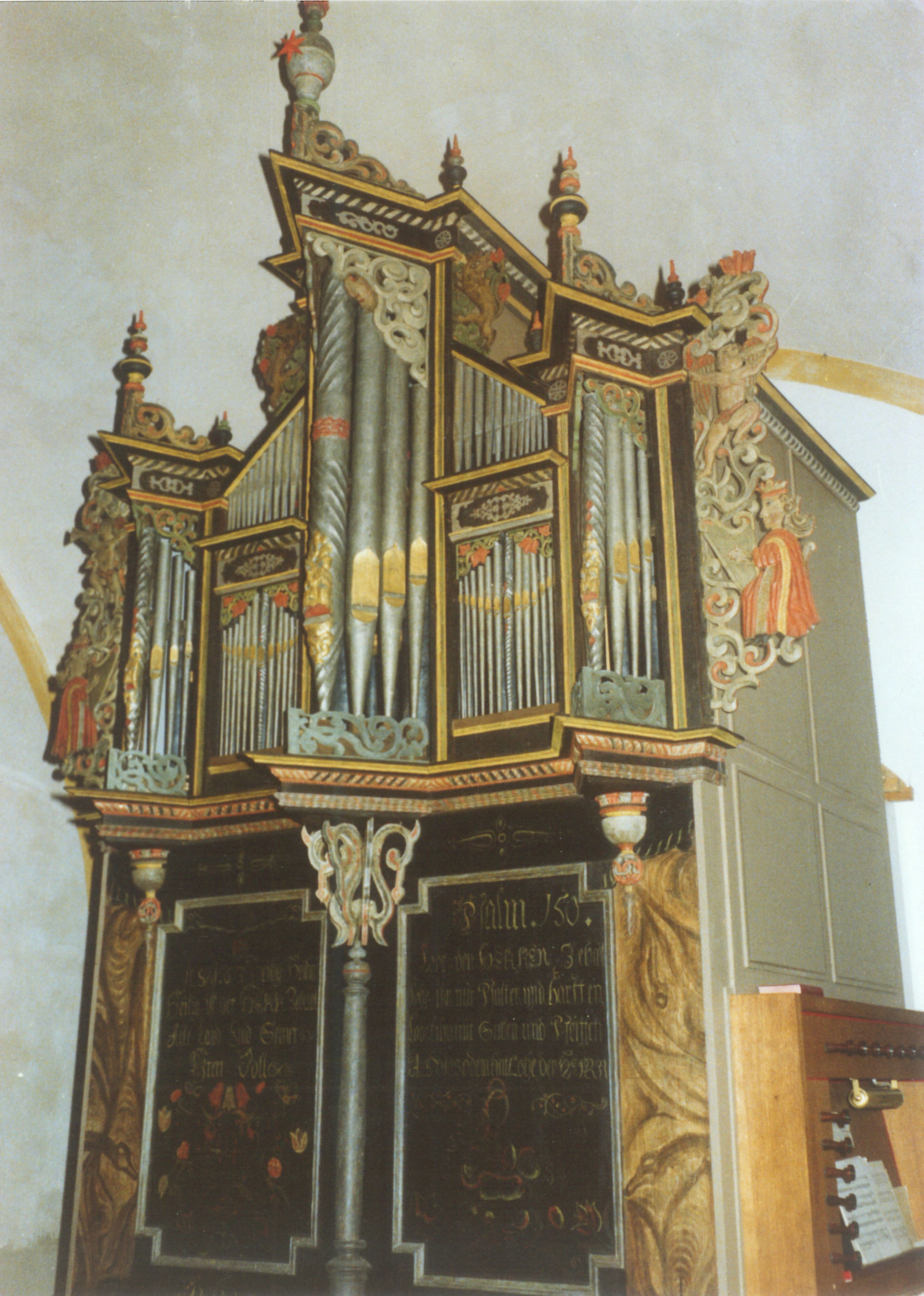 Orgel in Caldern